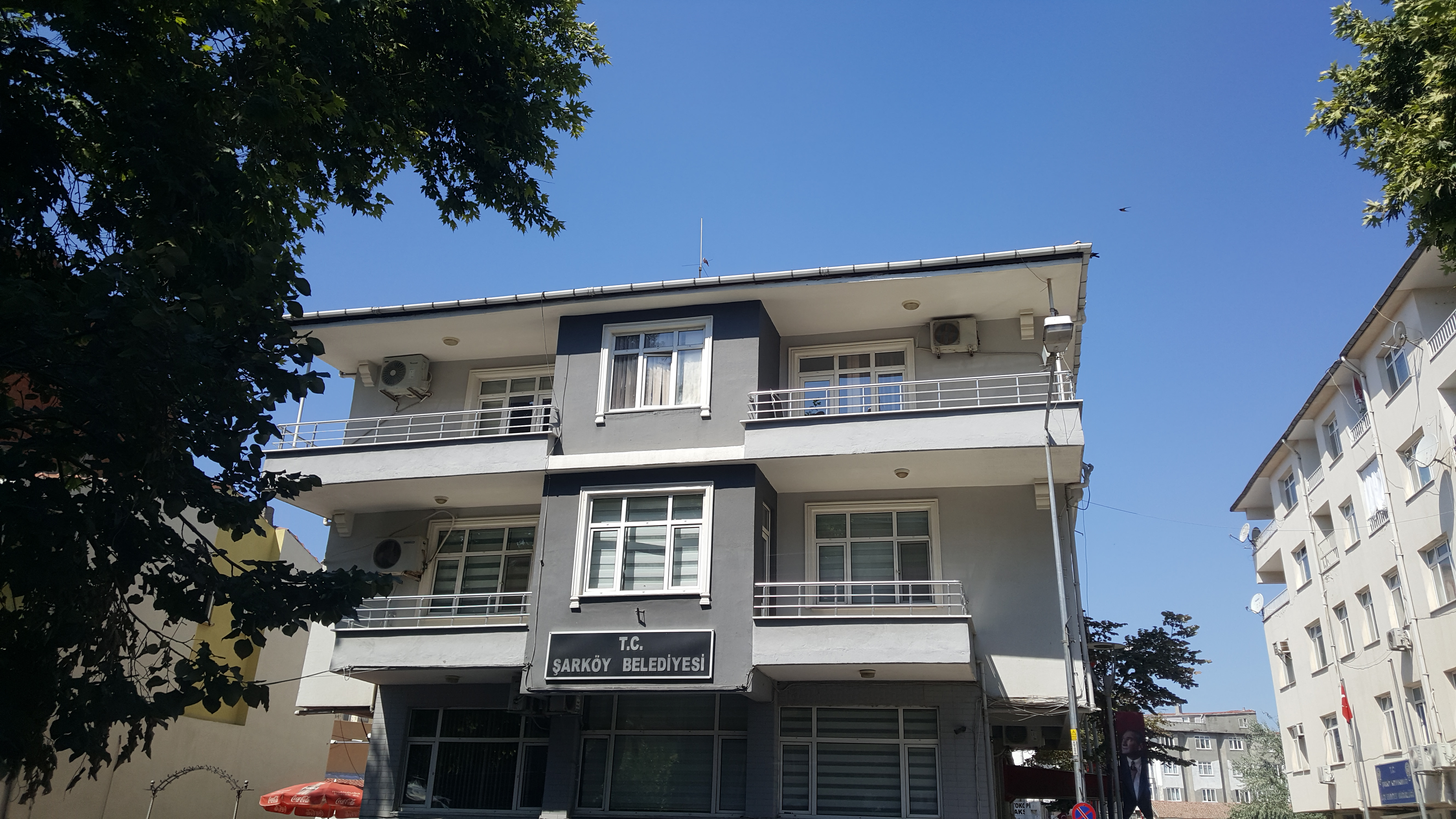 Şarköy Belediye binası